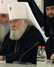 На встрече участников Архиерейского собора Русской православной церкви с Дмитрием Медведевым в Кремле